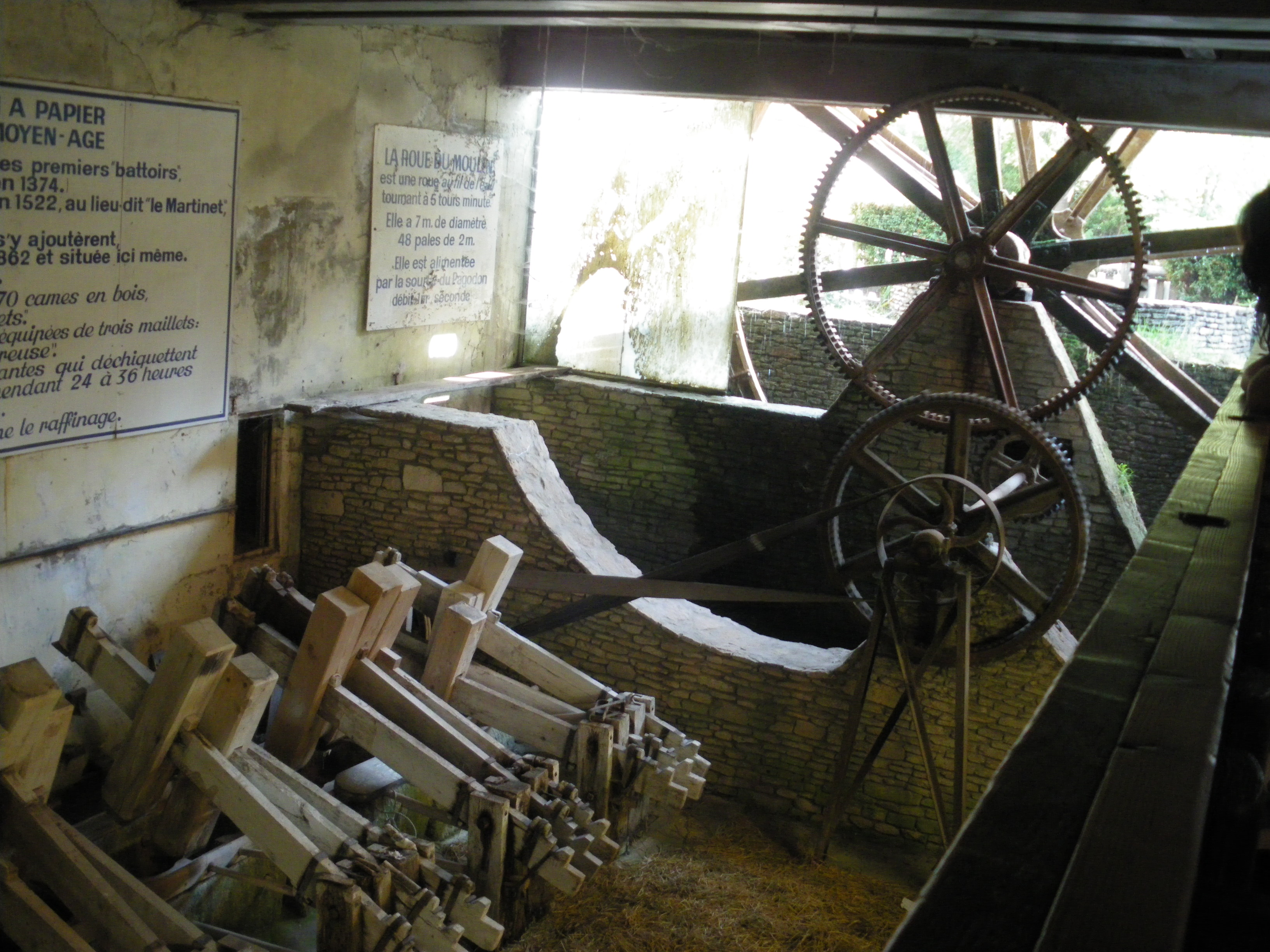 machinerie du moulin à papier de Fontaine-de-Vaucluse (Vaucluse, France)